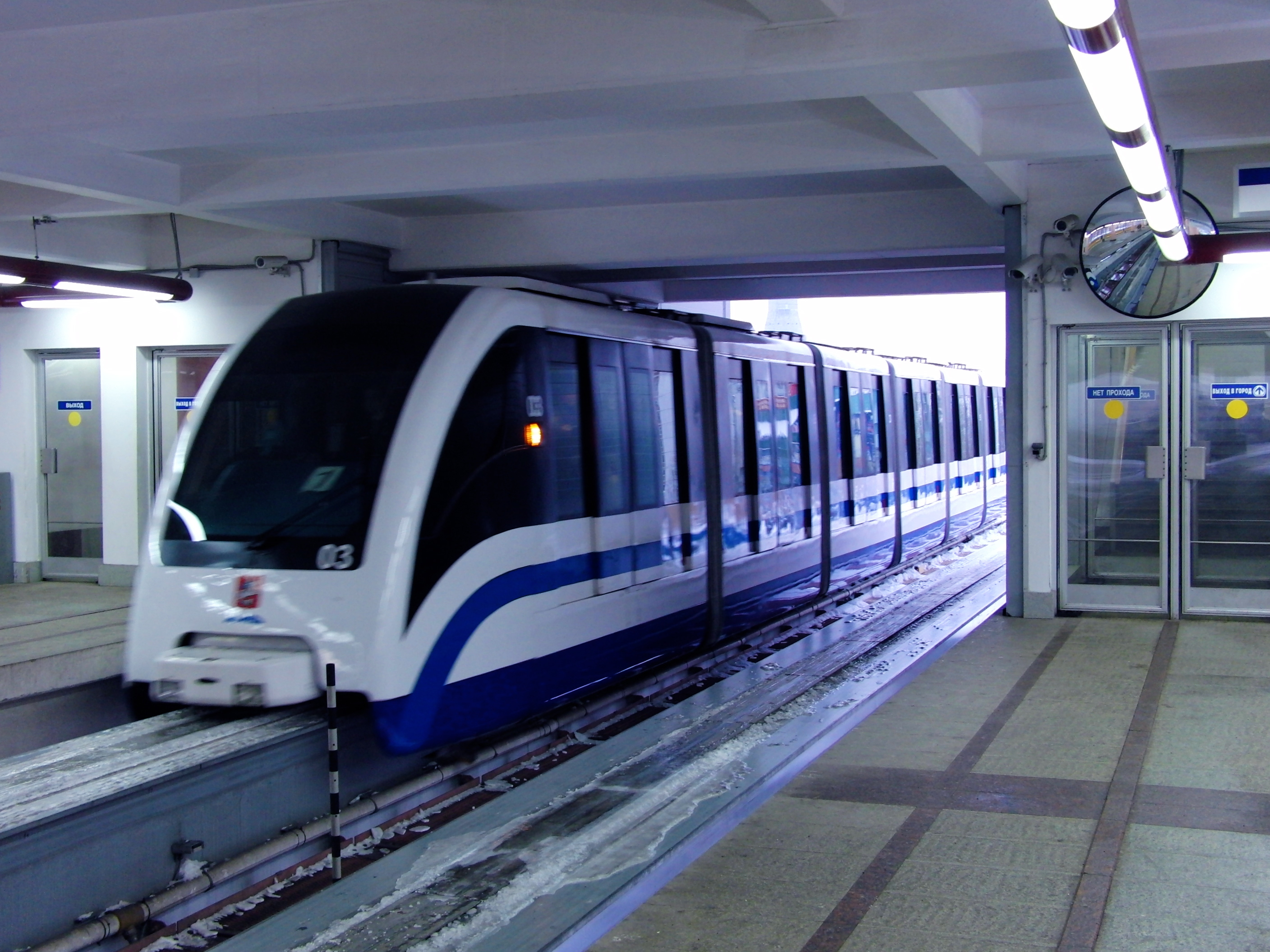 Moscow Monorail, Ulitsa Akademika Korolyova station (Московский монорельс, станция Улица Академика Королёва)